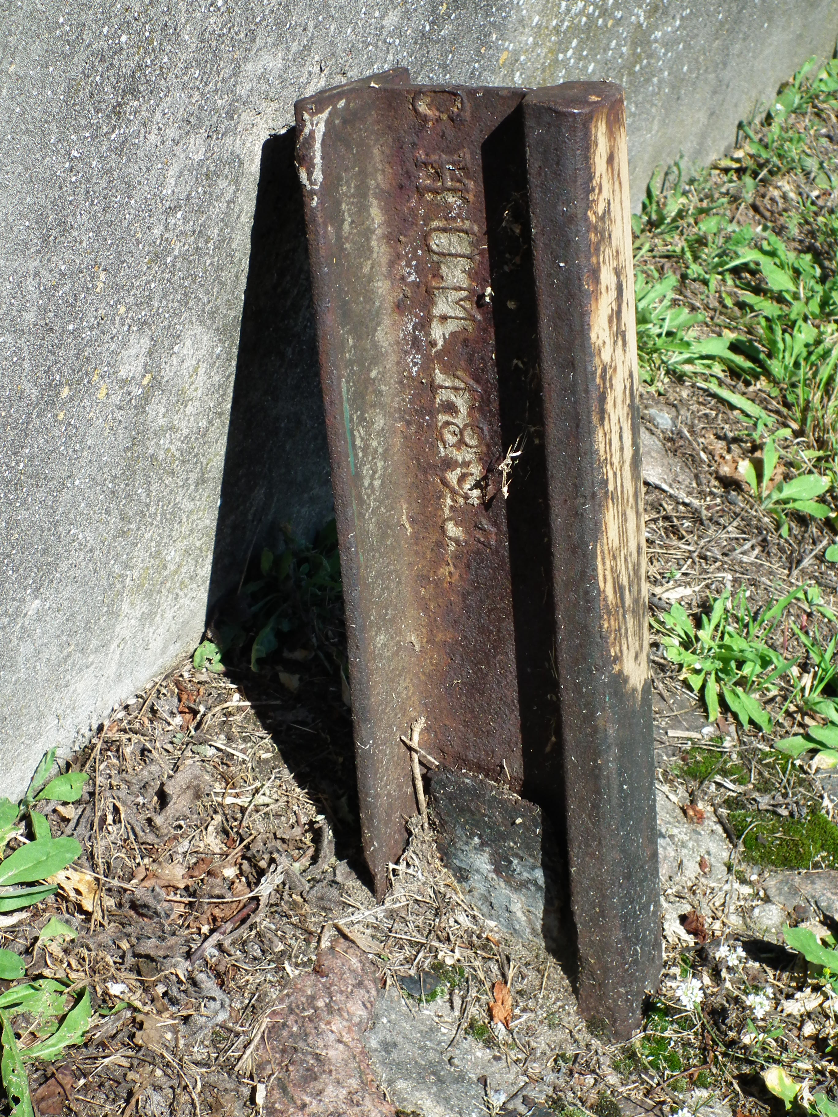 Dąbrówno - zespół dawnego kościoła ewangelicko-augsburskiego, obecnie metodystów.